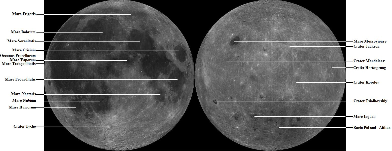 Carta dei faças de la Luna.